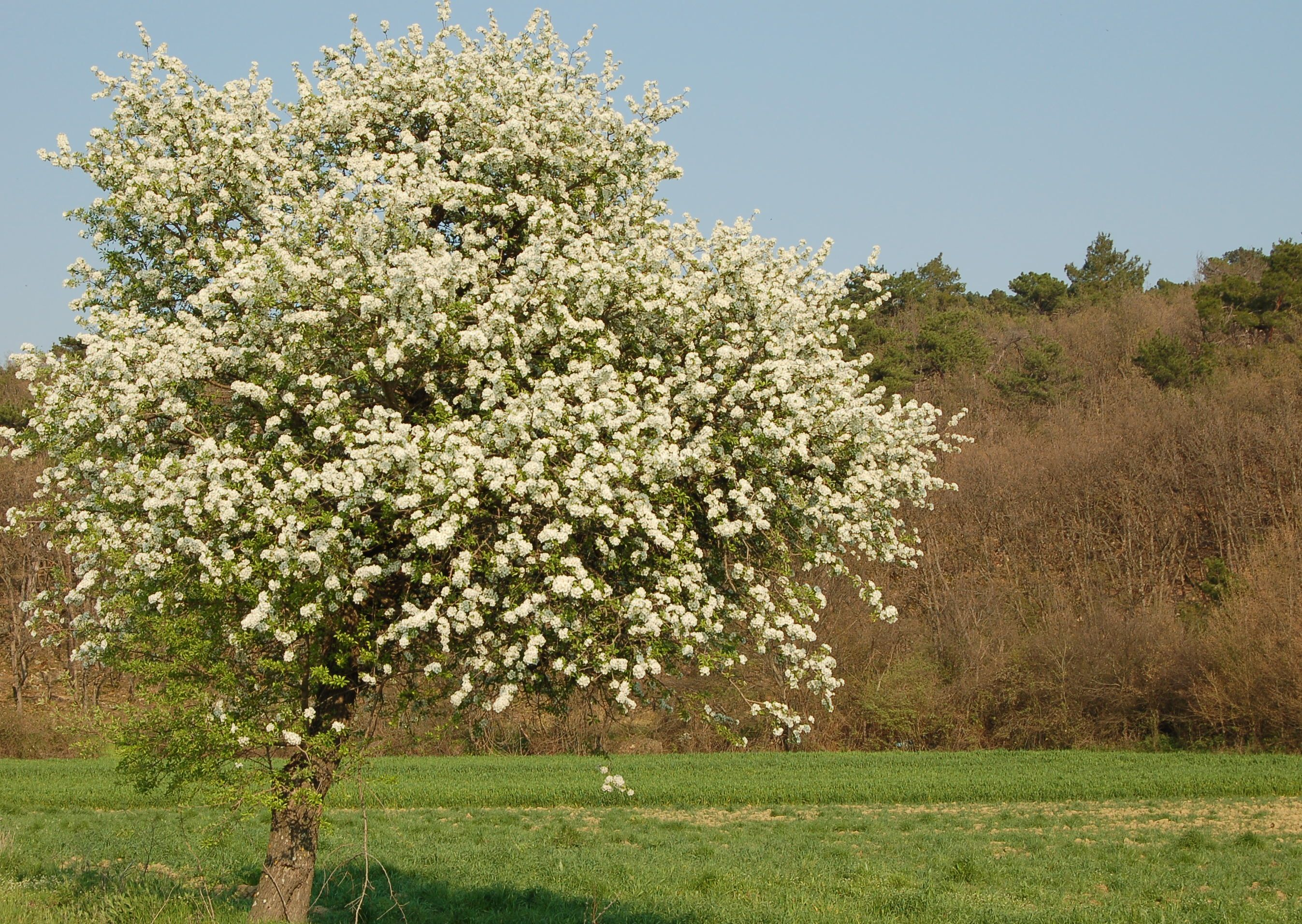 Άνοιξη 2007 - Λίγο πριν το δάσος της Δαδιάς...